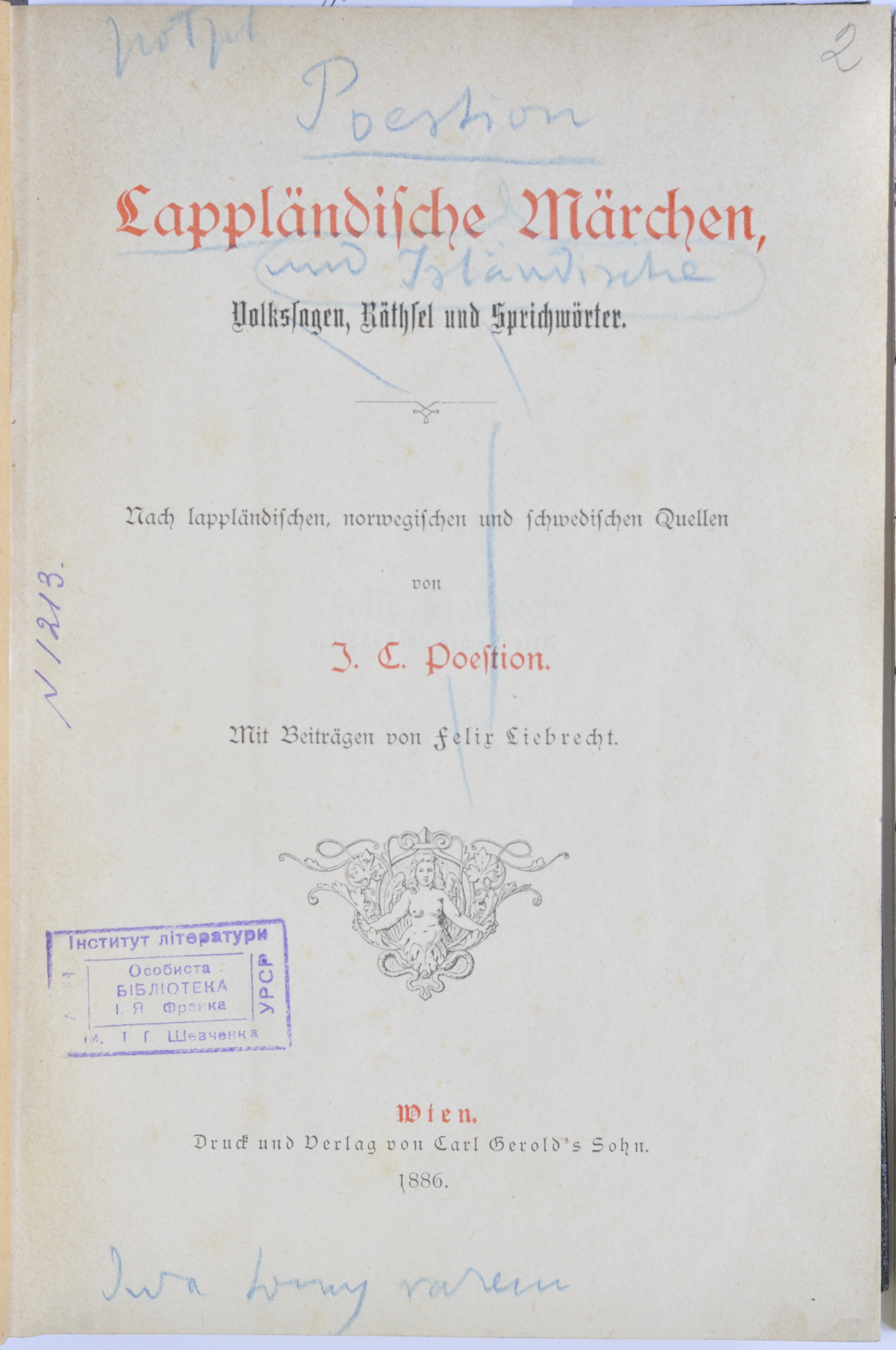 Lappländische Märchen. Відень, 1886. Титульний аркуш. З особистої бібліотеки І.Франка